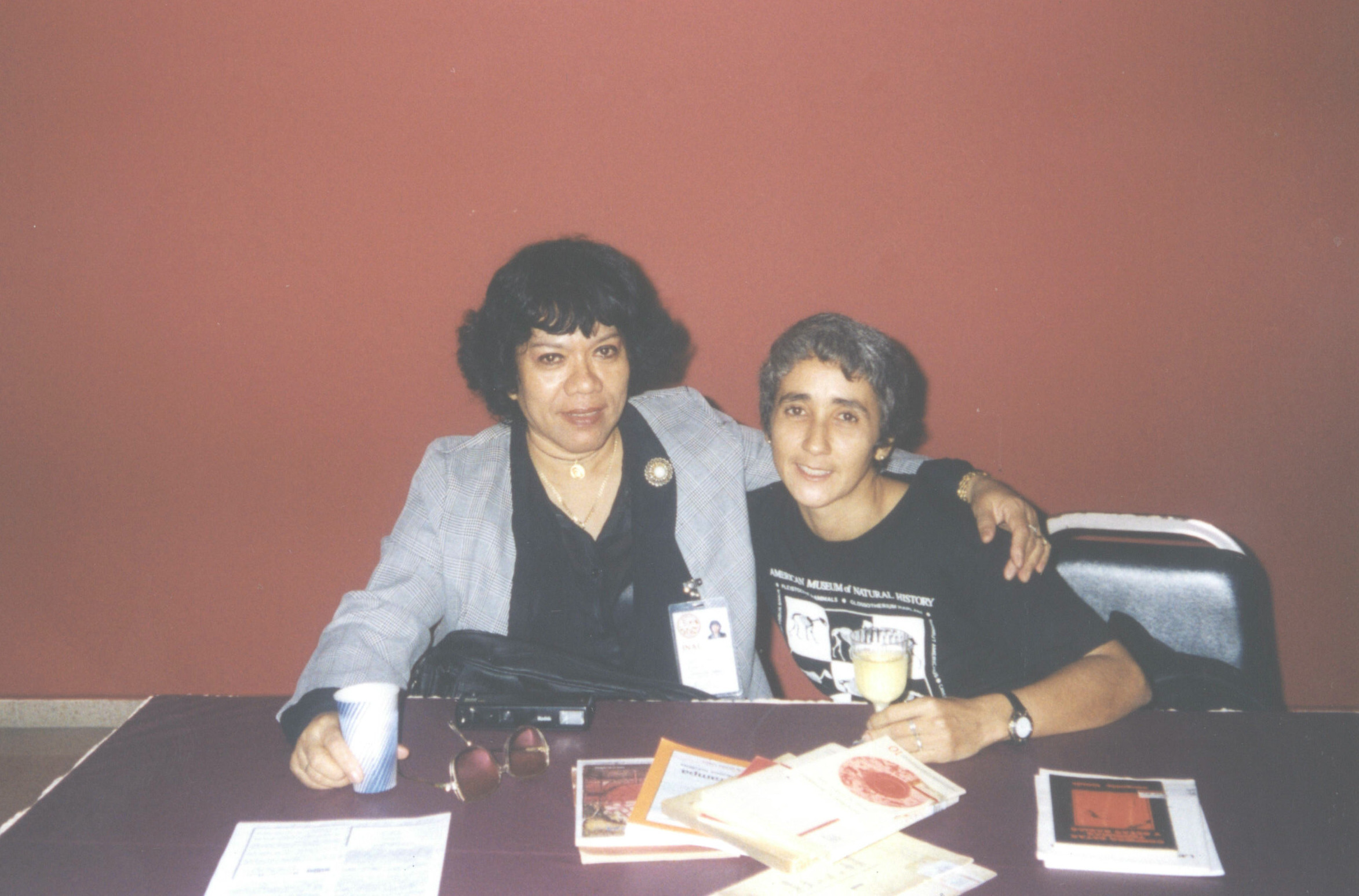 Las escritoras Moravia Ochoa y Consuelo Tomás a finales de los años 90 en la Biblioteca Nacional Ernesto J. Castillero R.